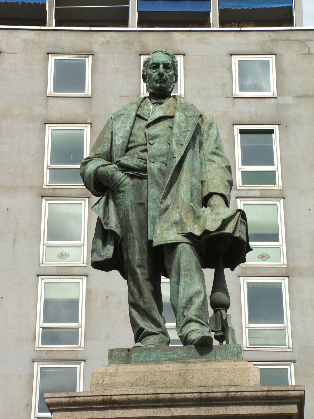 Genova, immagine dal porto antico, piazza Caricamento - statua a Raffaele Rubattino, armatore, padre della navigazione commerciale italiana.